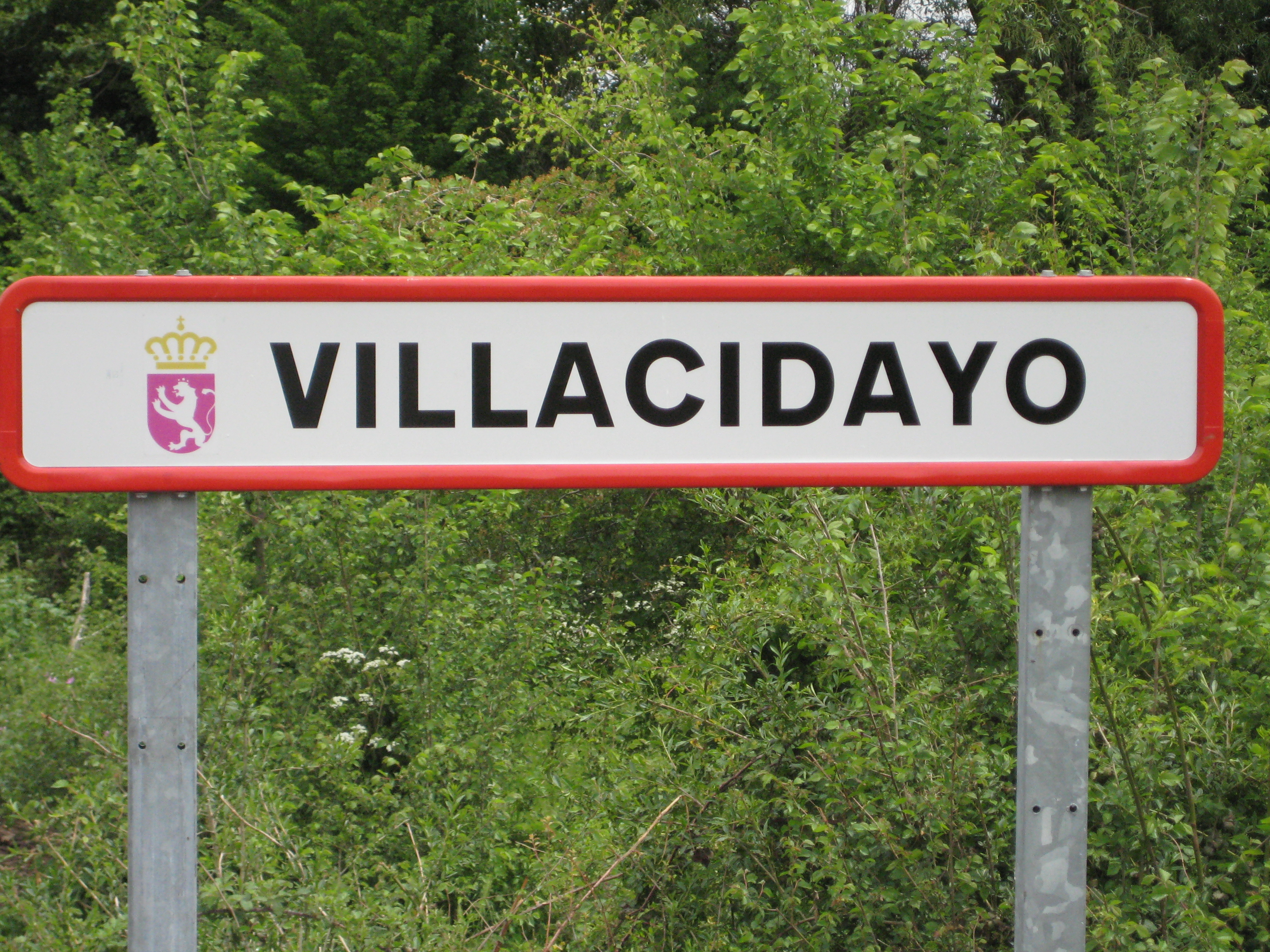 Letrero del pueblo a la entrada del pueblo a la altura del cementerio.